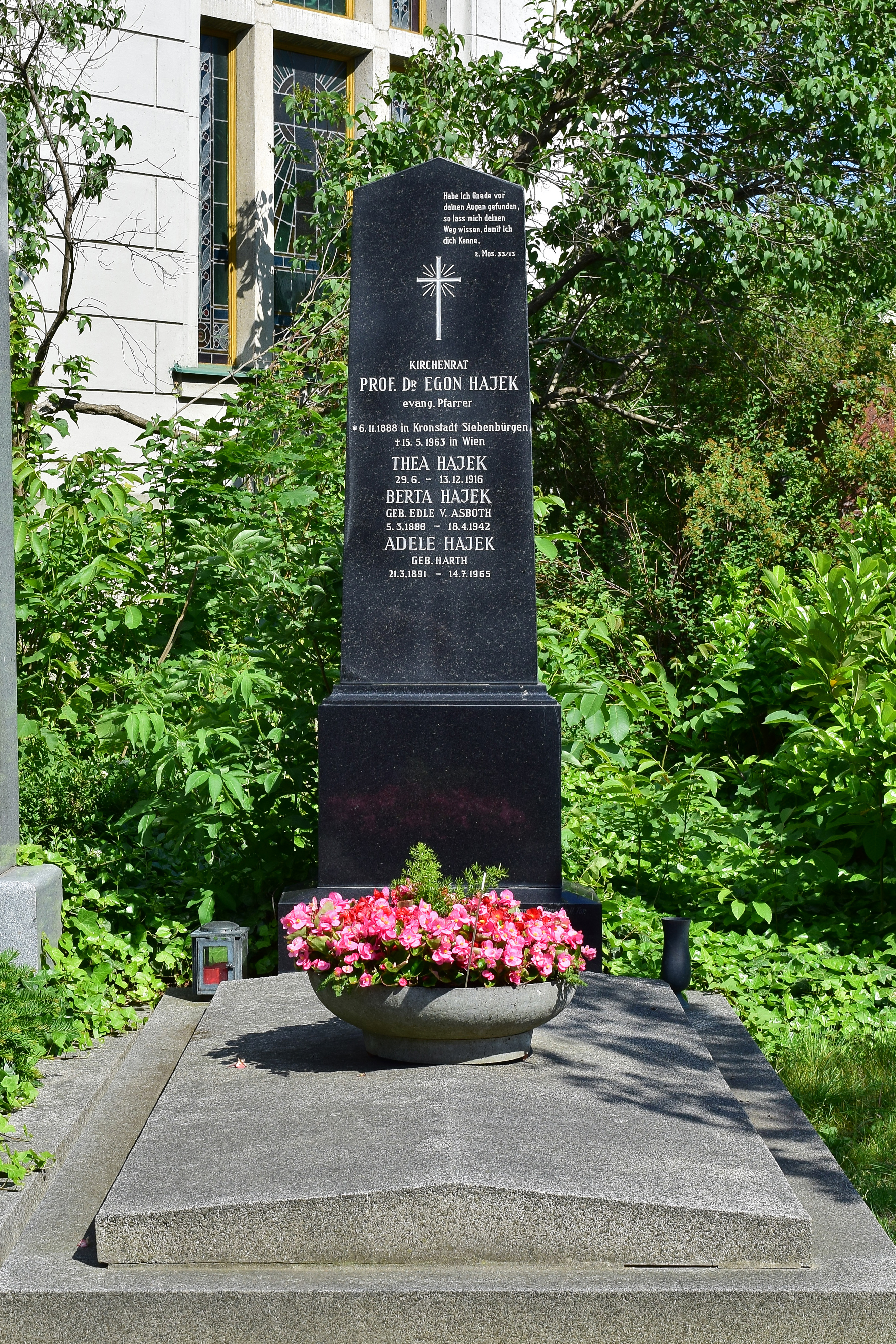 Ehrenhalber gewidmetes Grab von Egon Hajek auf dem evangelischen Friedhof im Wiener Zentralfriedhof, Pfarrgräber, Nr. 3